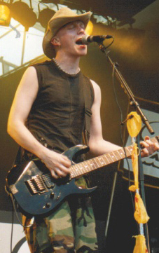 Toni Wirtanen